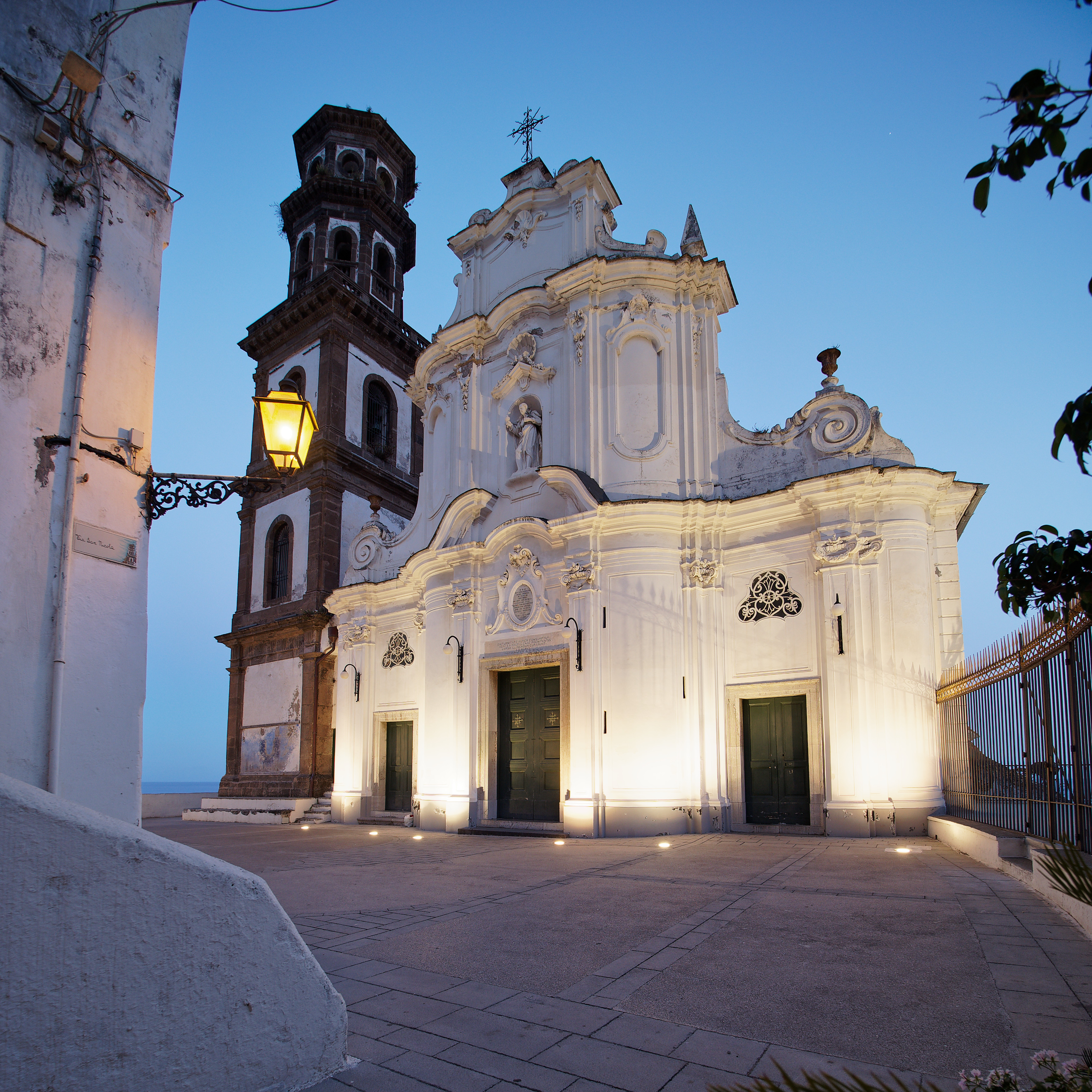 Fassade und Turm der Kirche Sankt Maria Magdalena in Atrani, Kampanien, Italien.